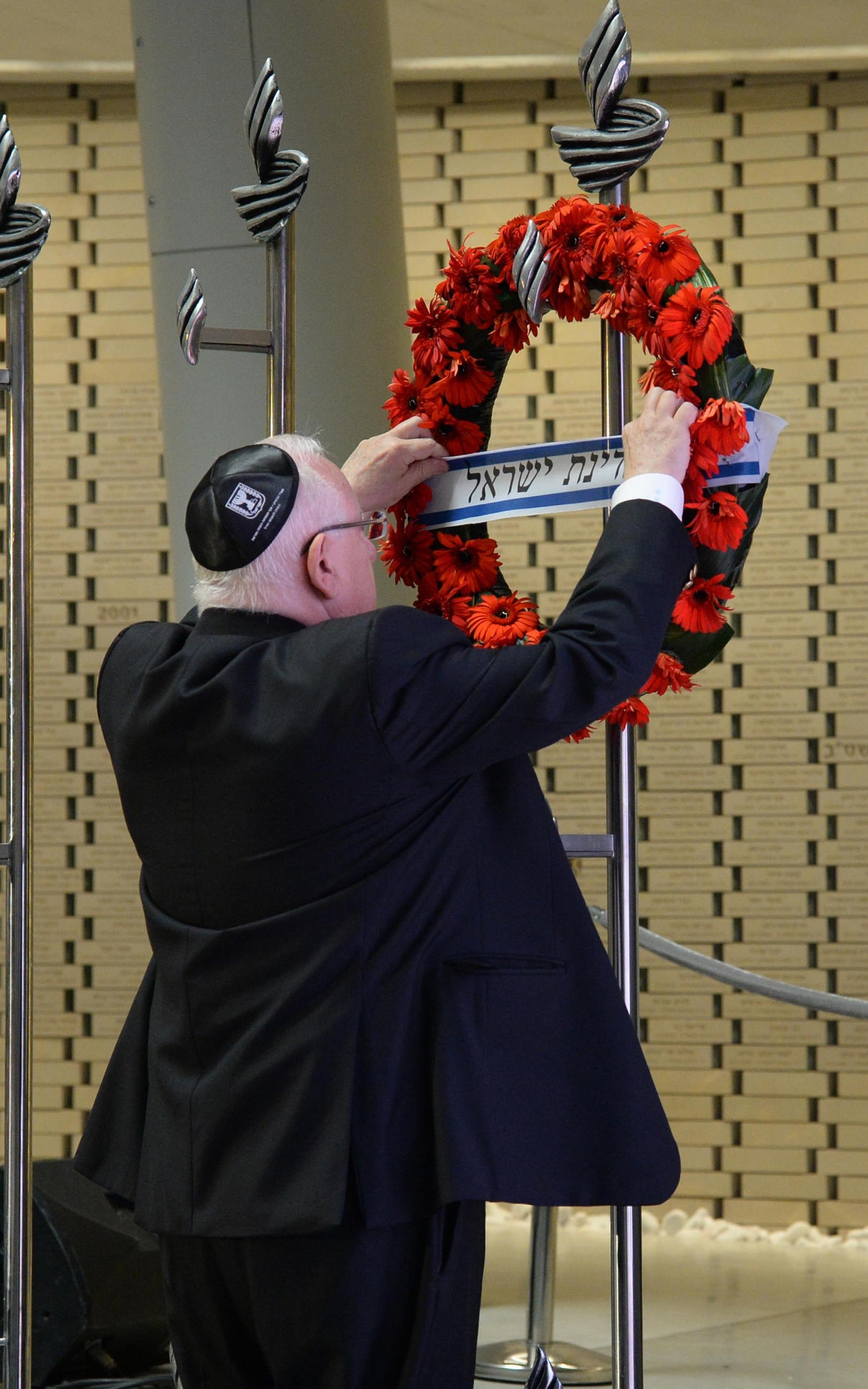 נשיא מדינת ישראל ראובן ריבלין מניח זר בטקס האזכרה לחללי מלחמת לבנון השנייה